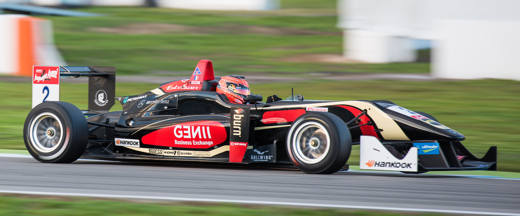 DTM,Dallara F312,Deutsche Tourenwagen Masters,Esteban Ocon,F3 FIA European Championship,FIA Formel 3 Europameisterschaft,Hockenheimring,Mercedes-Benz,Motorsport,Prema Powerteam